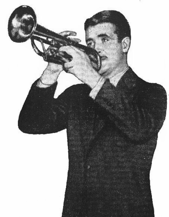 Bunny Berigan